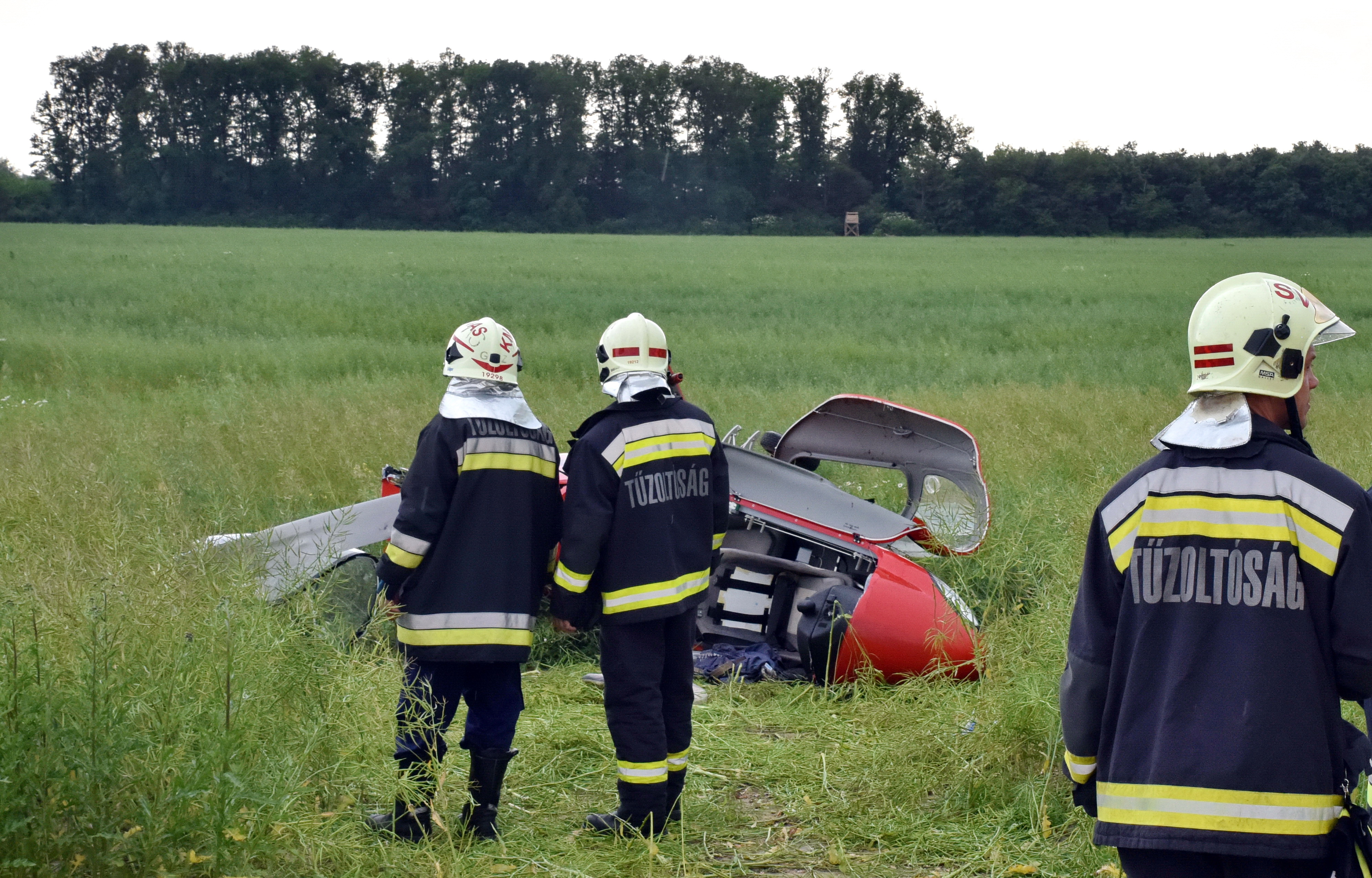 A girokopter 25 kilovoltos vezetéknek ütközött és lezuhant. Az osztrák pilóta nem veszítette el az eszméletét, lábsérüléssel megúszta a balesetet. Fotó: Tánczos Mihály / 112Press